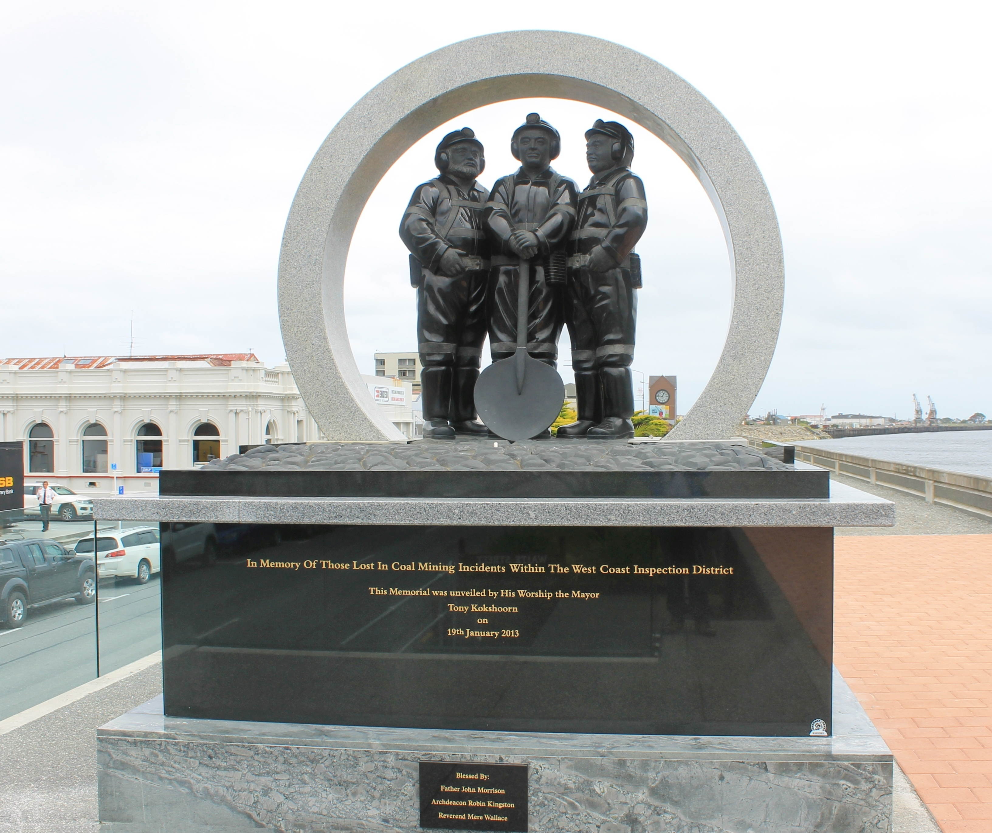 Minenarbeiter-Denkmal, Greymouth